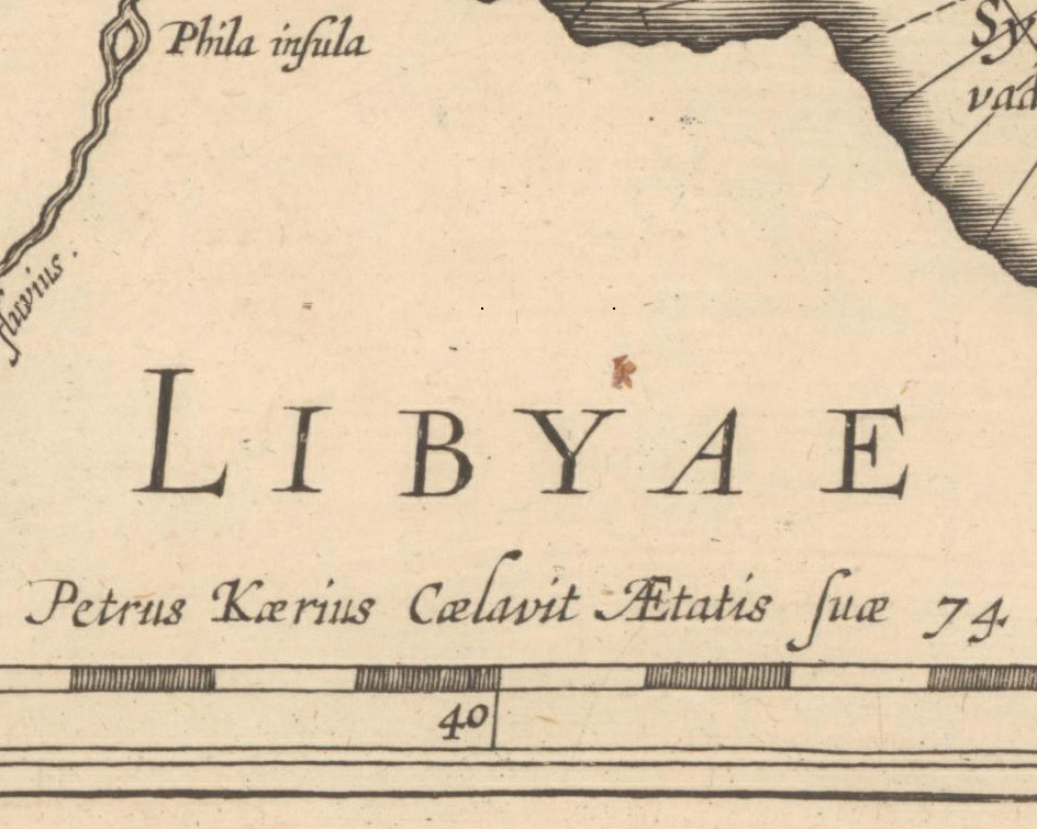 Detail uit: Argonautica